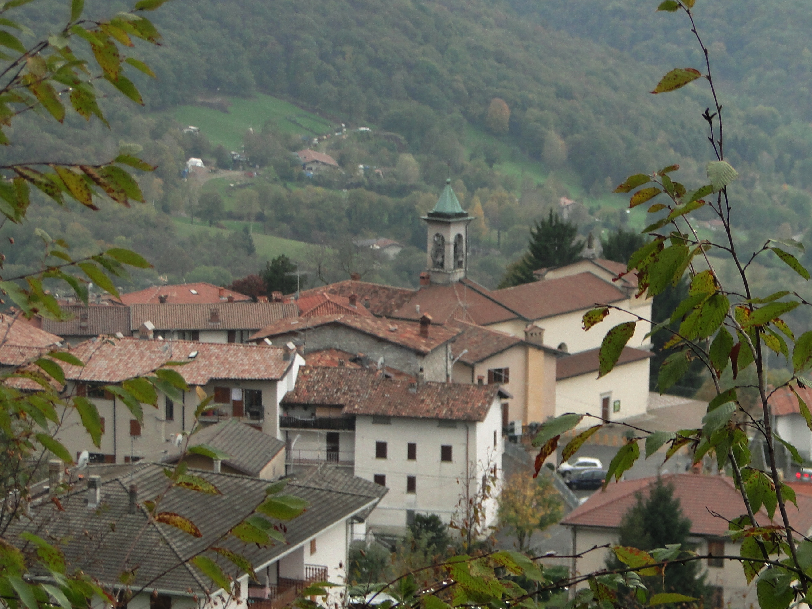 Casale, frazione di Albino (BG). Vista